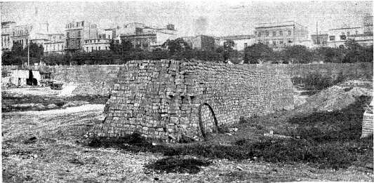 Vista de una pila de ladrillos en las obras del Palacio de Correos de Buenos Aires, en 1888.